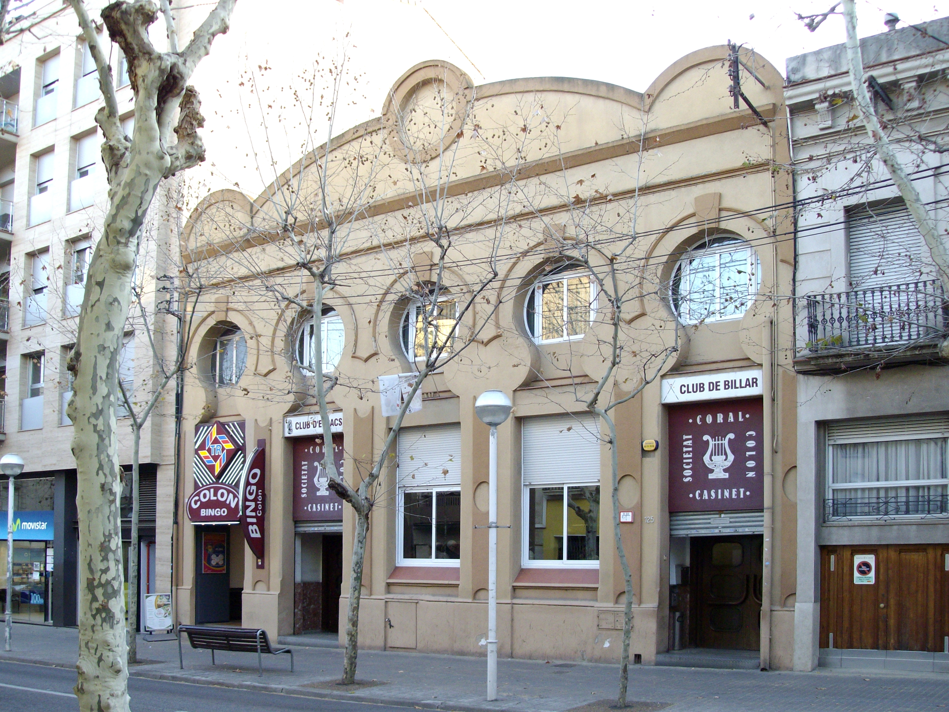 Societat Coral Colon, edificio construido en 1905 por Rafael Estany i Casals, posteriormente, en 1923 Josep Renom i Costa construye un teatro en el solar del jardín de la entitad (planos firmados por Agustí Domingo i Verdaguer). Está situado en la avenida de l'Onze de Setembre, 125, en Sabadell, Barcelona (España).